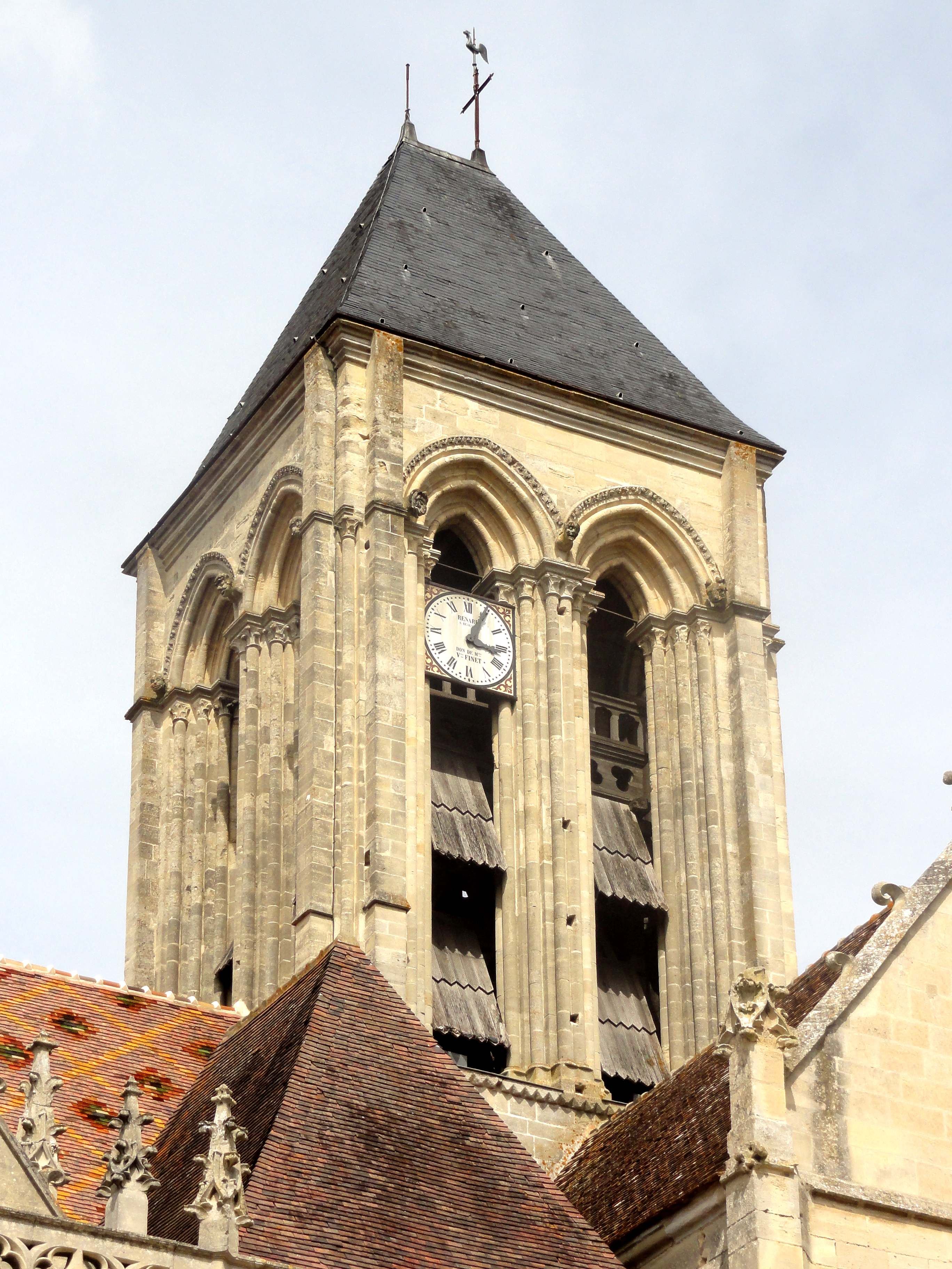 Clocher.